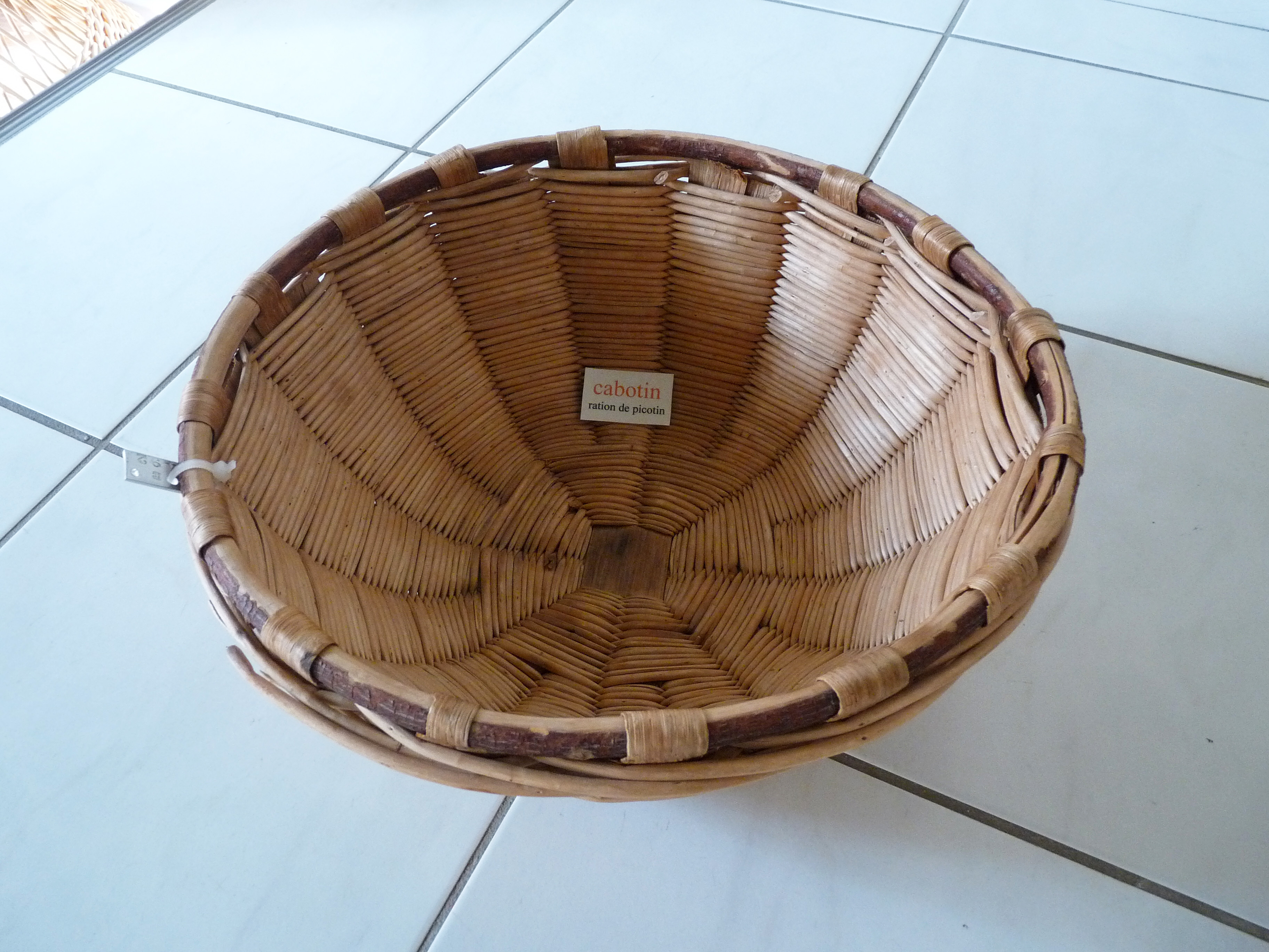 Cabotin (ration de picotin) à la Maison de la Vannerie (Fayl-Billot, Haute-Marne)